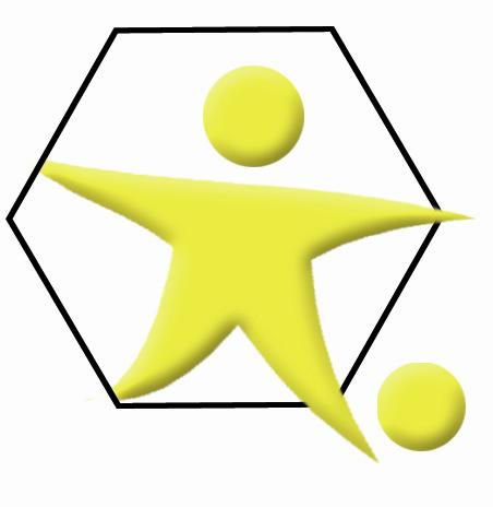 Logo des Vereins Bistumsliga Berlin e.V.